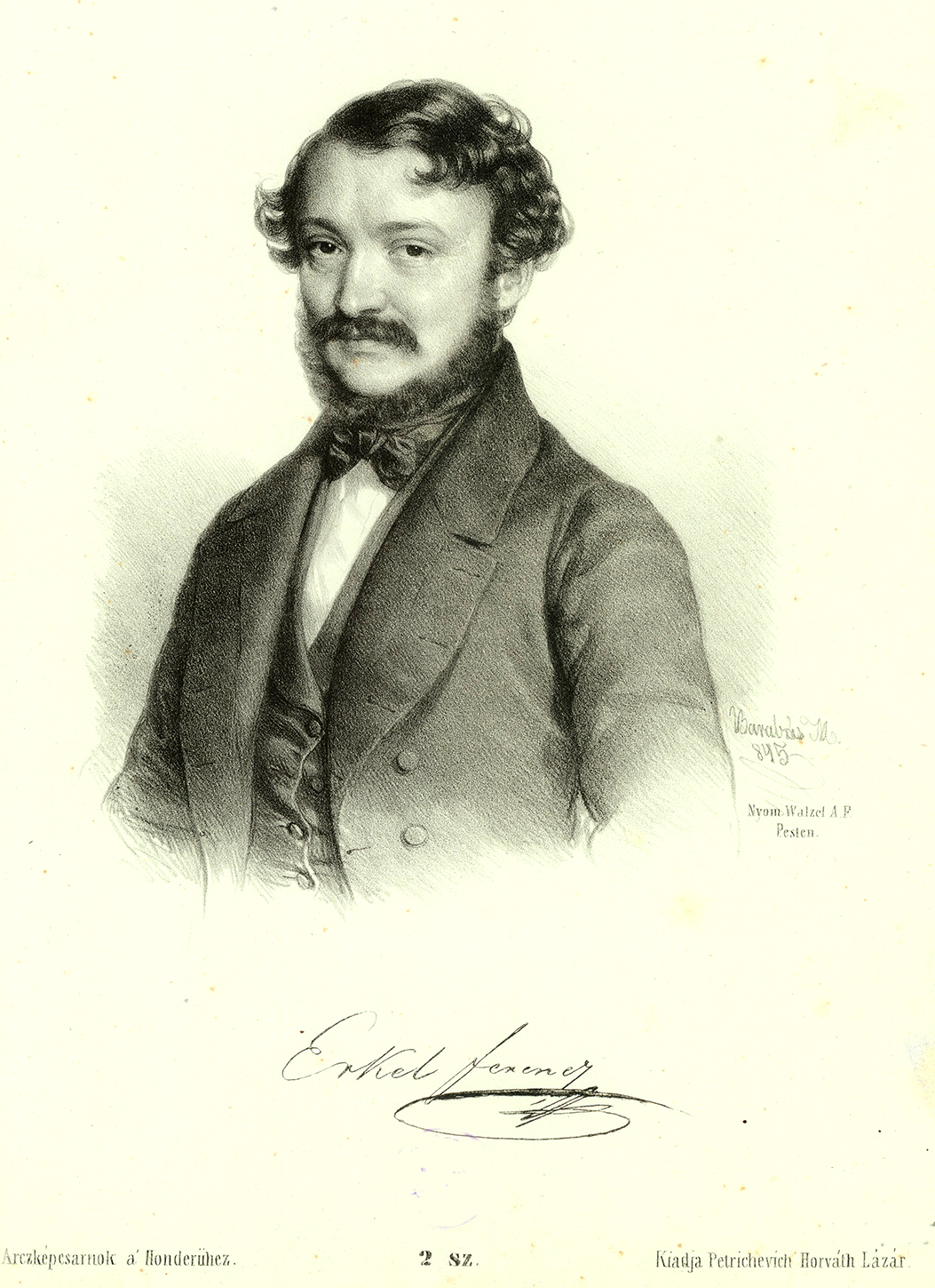 Erkel Ferenc (Németgyula, 1810. november 7. – Budapest, 1893. június 15.), magyar zeneszerző